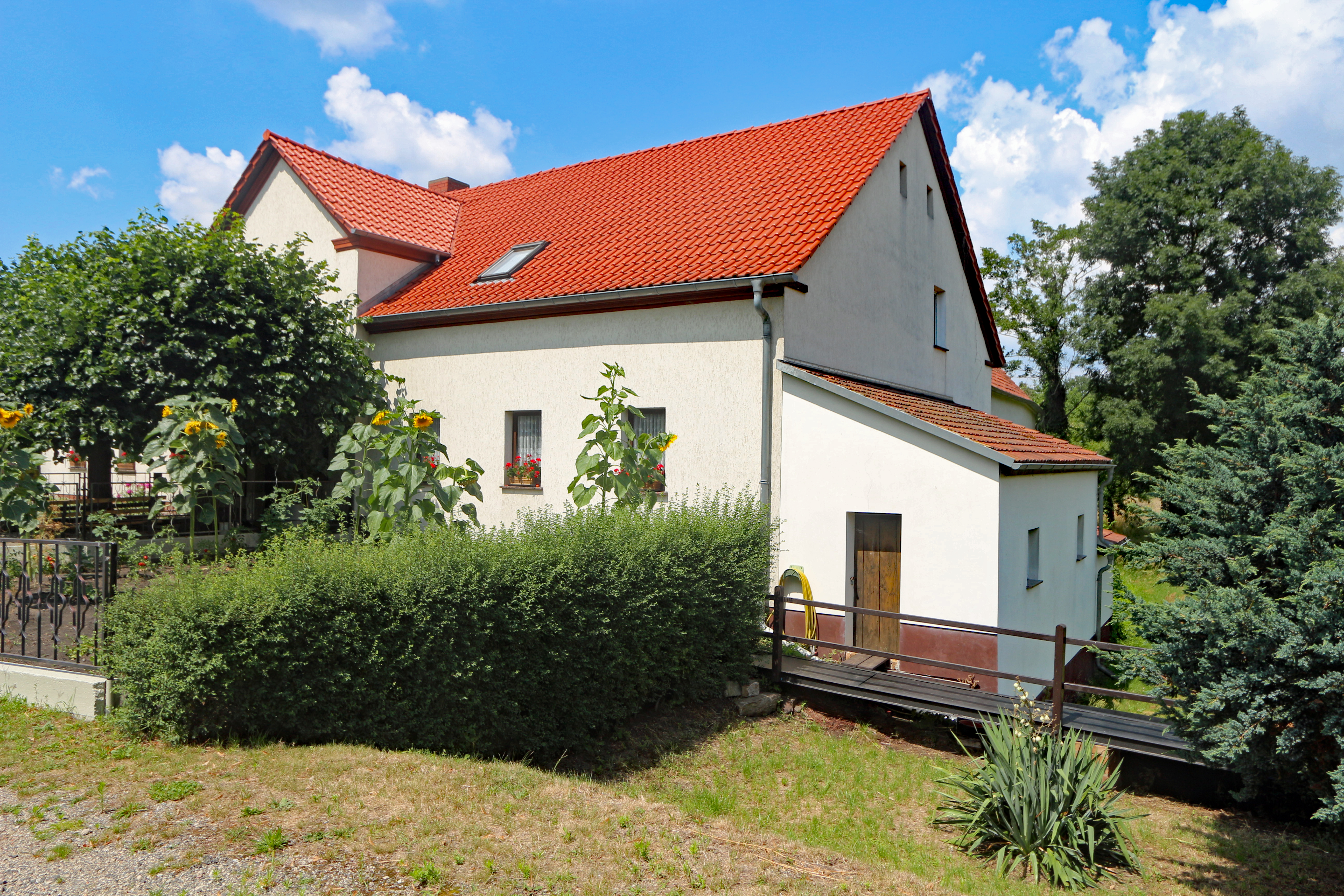 Ehemalige Wassermühle in Riegel (Lohsa, Sachsen, Deutschland)